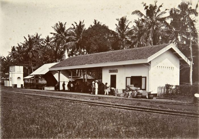 Foto. Het station van Soekaradja, Midden-Java.